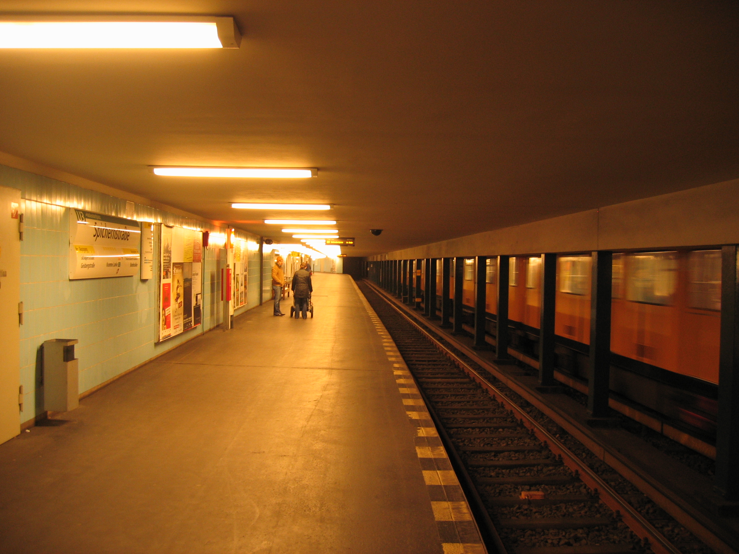 U-Bahnhof Spichernstraße der U3, Berlin